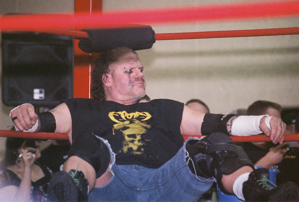 from Franklin, PA 4-10-10